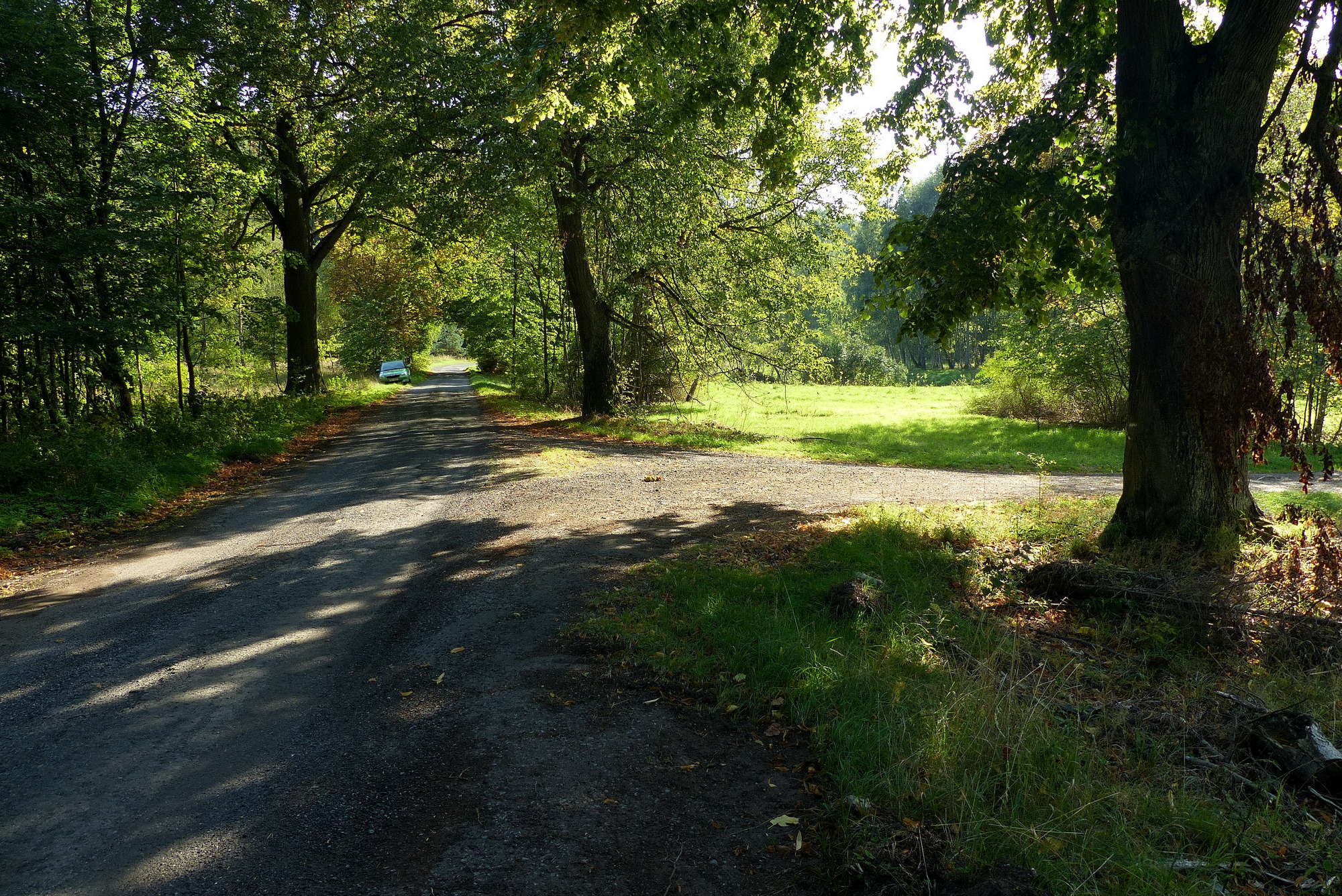 Křižovatka a bývalá náves v Holičkách